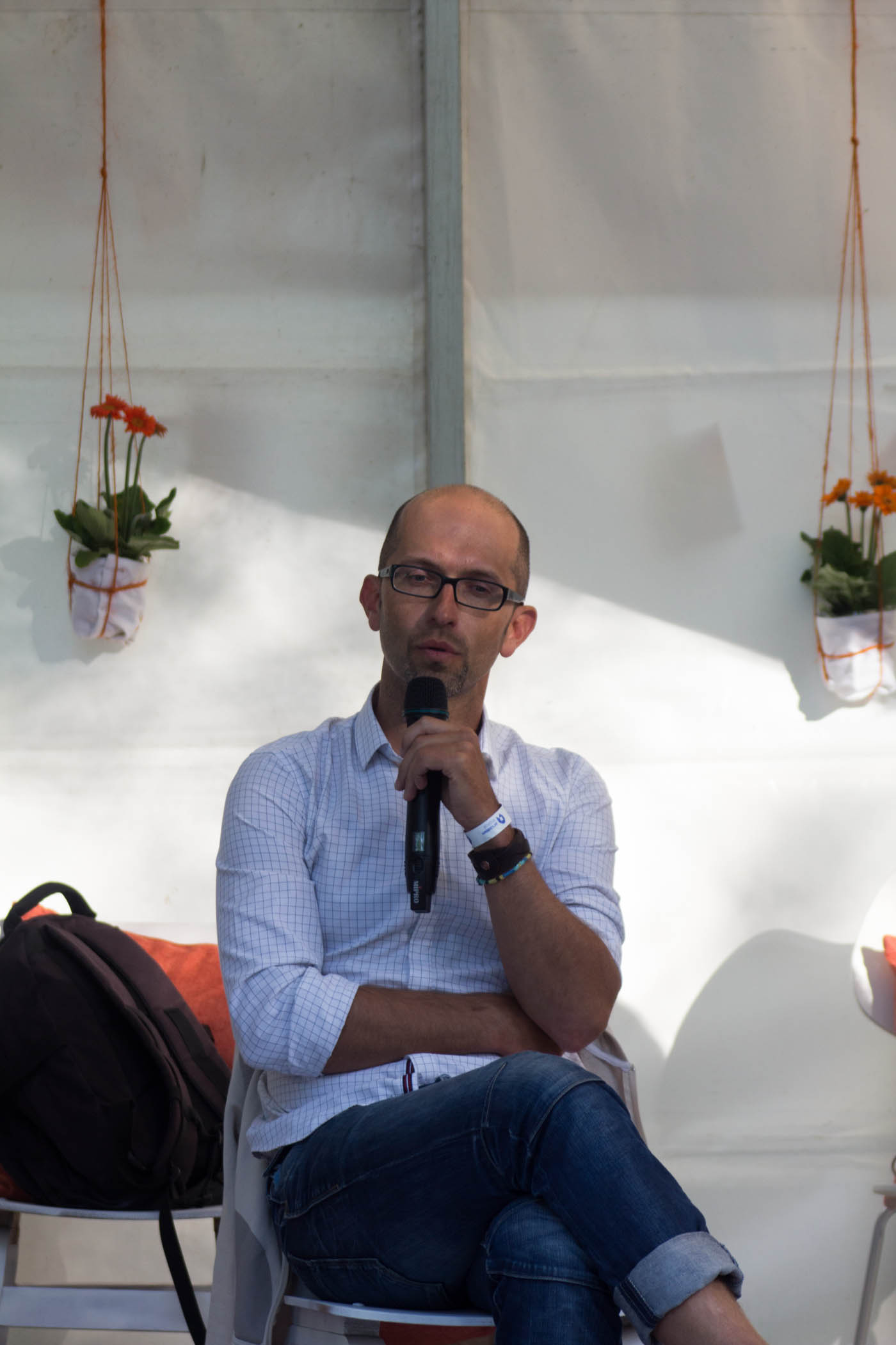 Mihkel Kärmas arutlemas teemal "Eetilised valikud laste teemade kajastamisel ajakirjanduses "